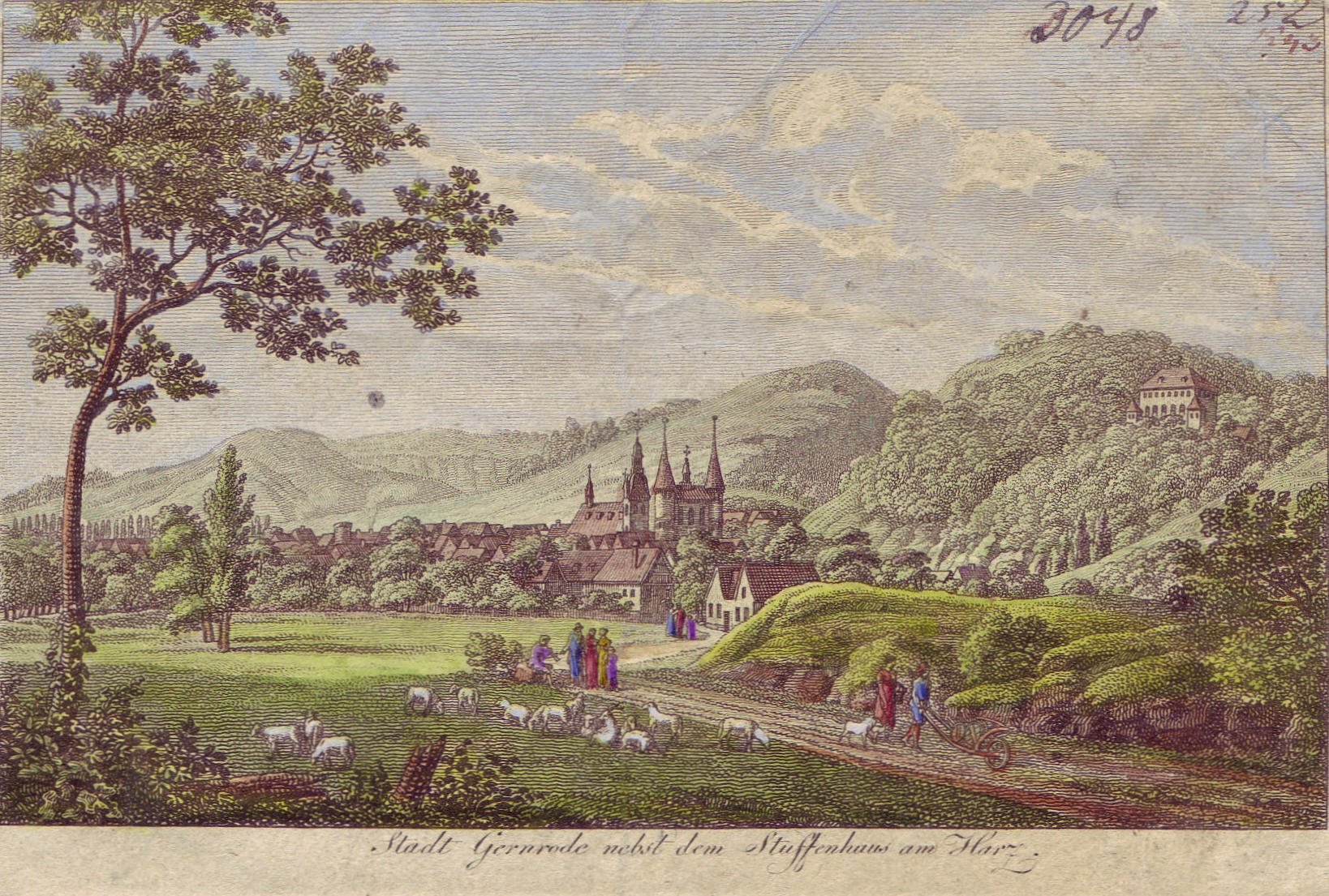 Ortsansicht um 1828